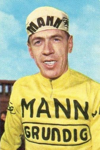 Herman Van Springel en 1970 - Campioni dello Sport 1970-1971, n°150.